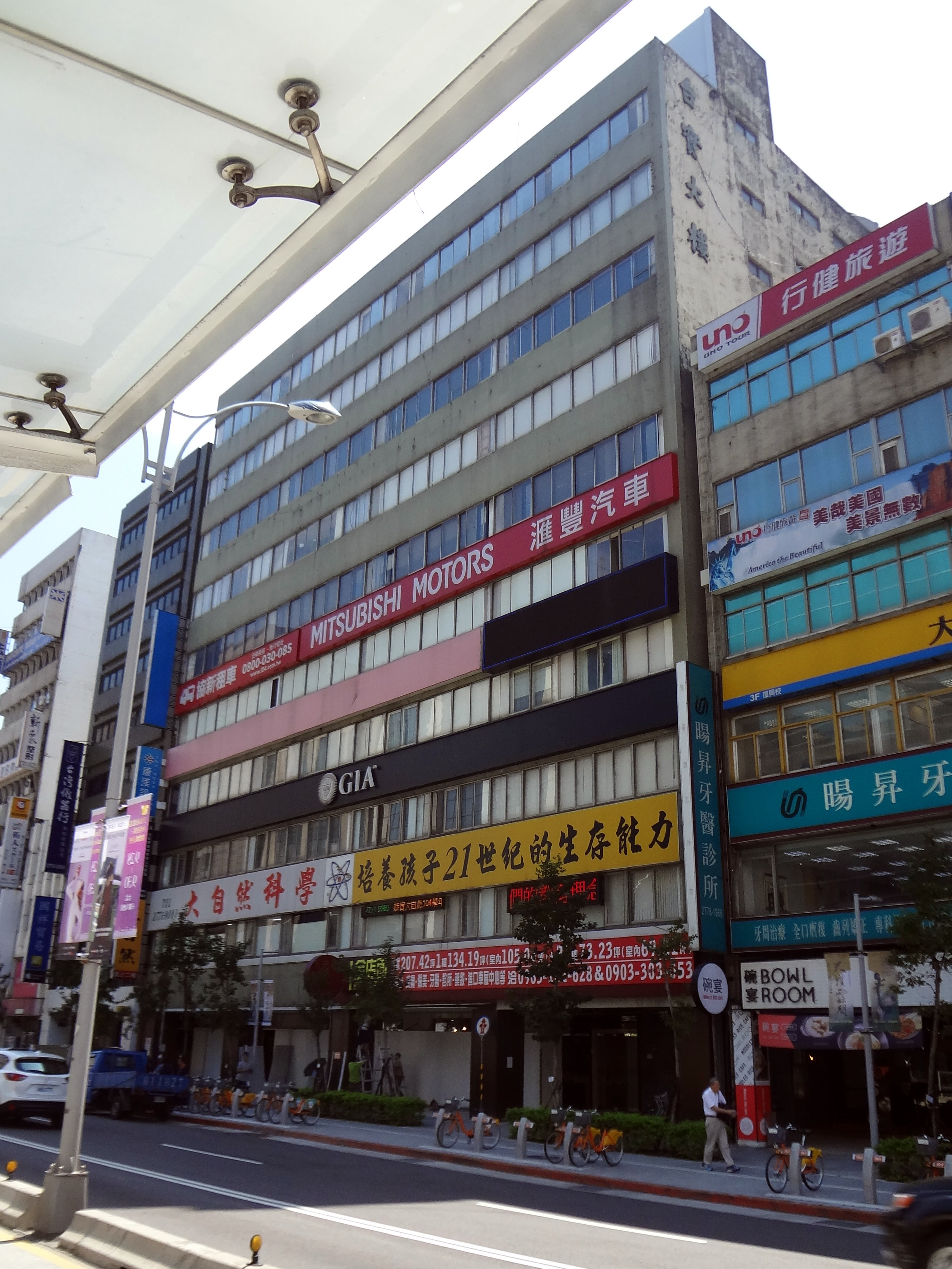 台實大樓，位於臺北市松山區南京東路三段270號。匯豐汽車總部位於5樓。